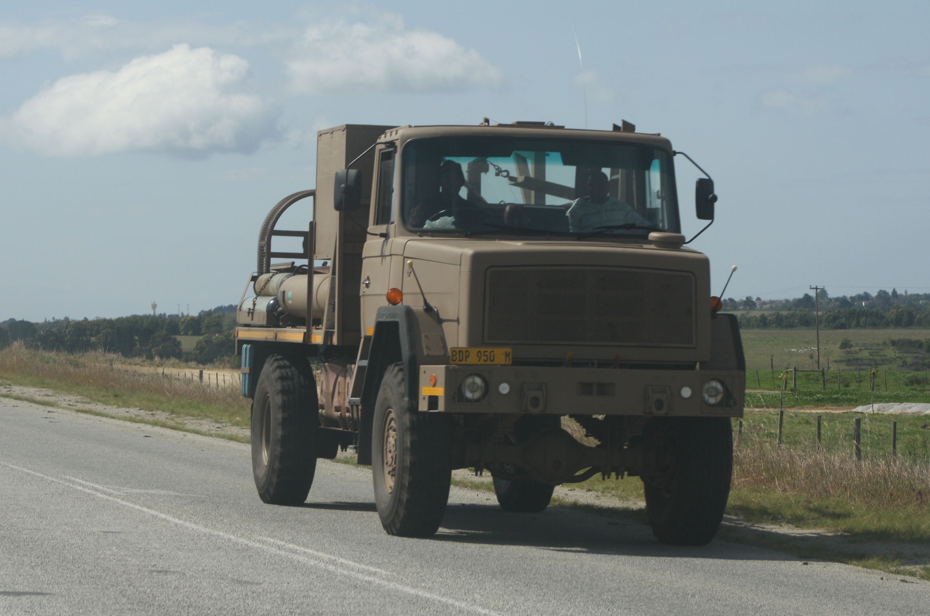 SANDF Samil 50